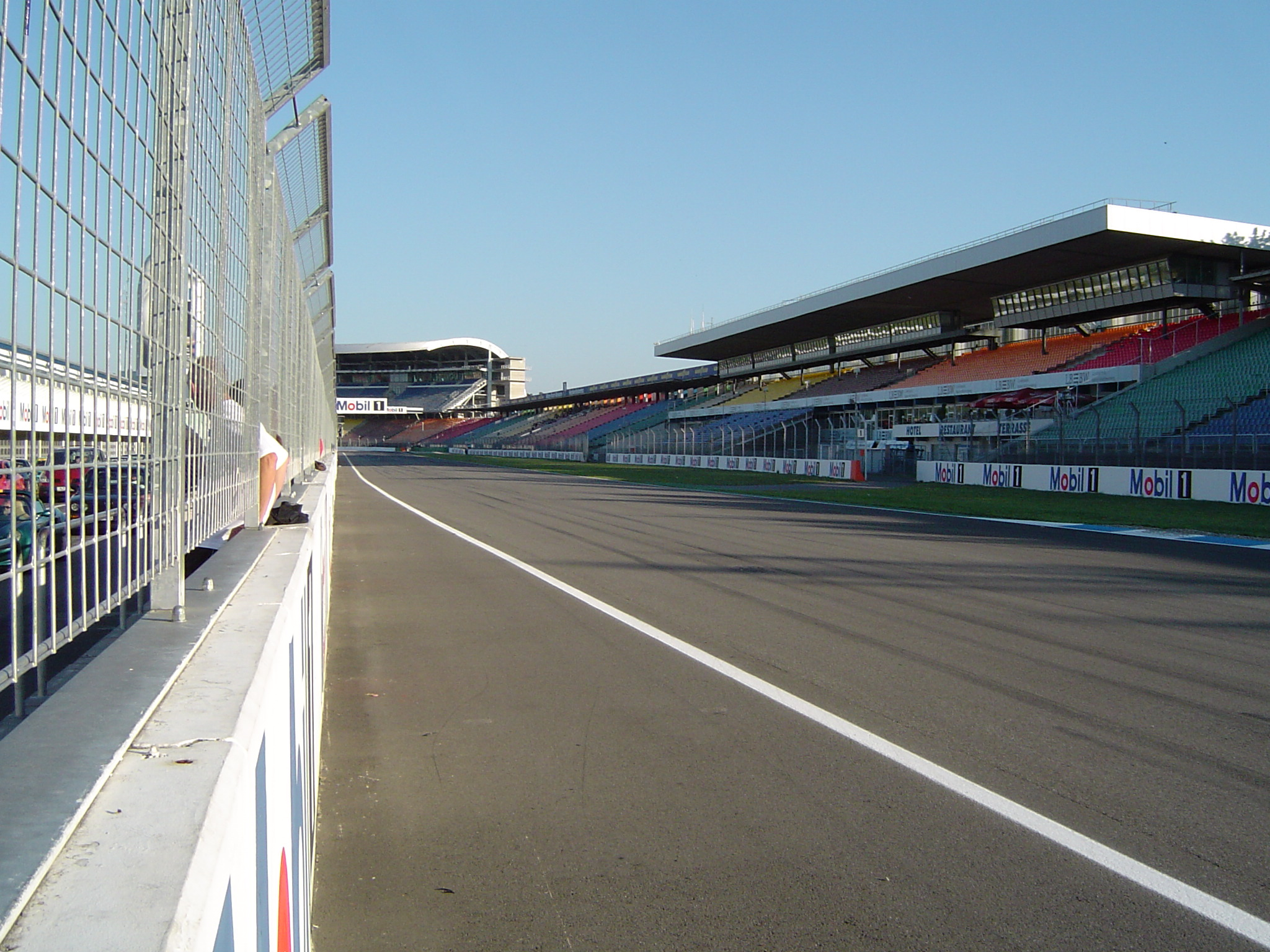 Die Start- und Zielgerade des Hockenheimrings, Blick von der Boxenmauer.